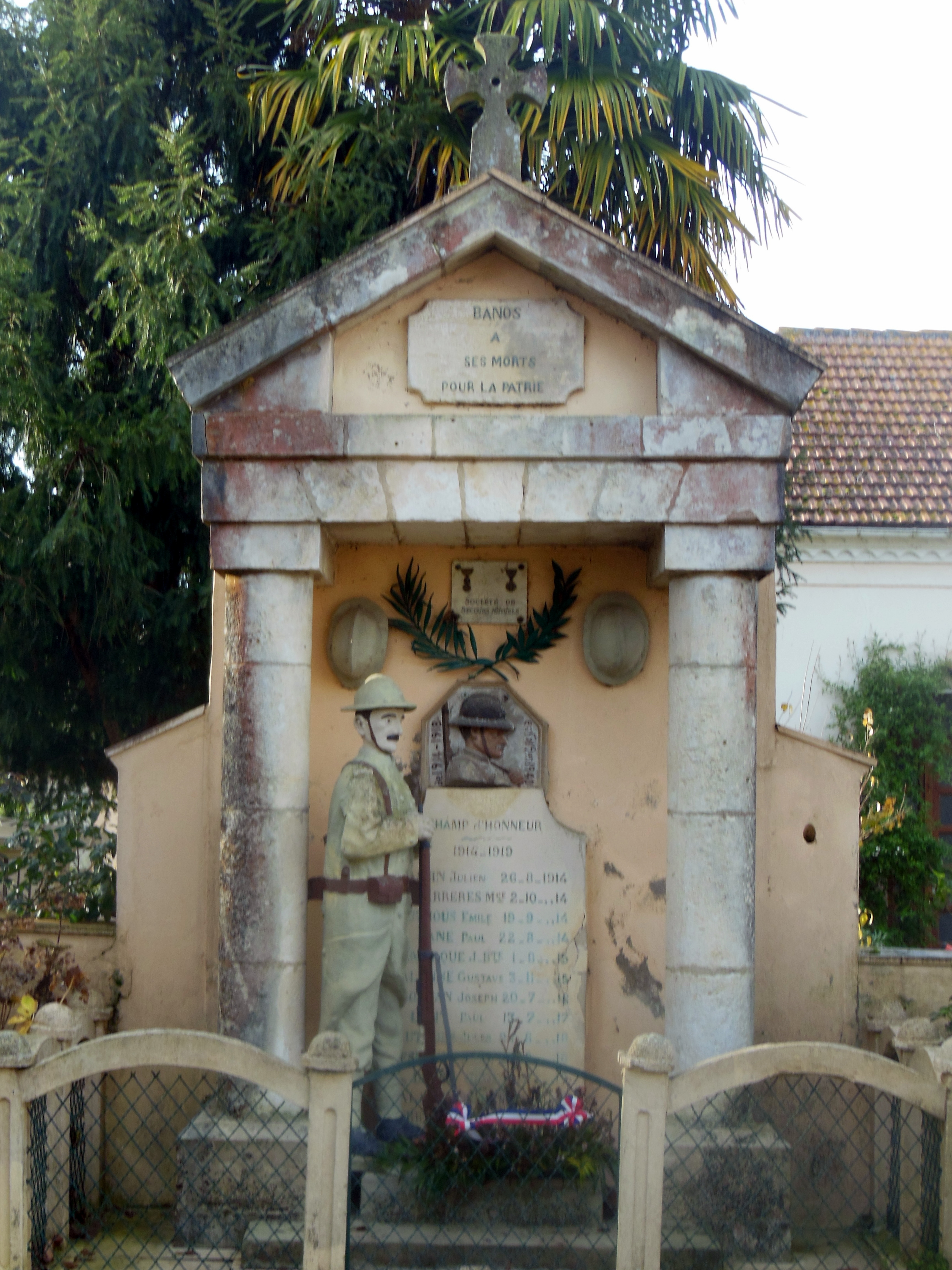 Monument aux morts de Banos (Landes, France)